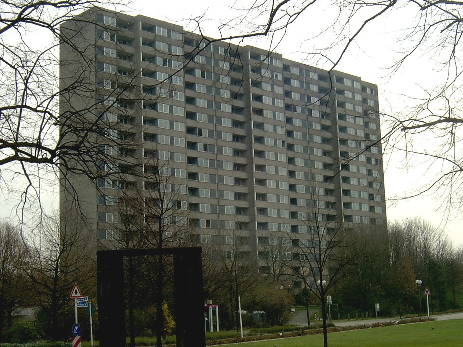 "Goliath", ein ehemaliges Wohnhochhaus an der Bergstraße im Marler Zentrum, erbaut 1972/73. Das Gebäude wurde am 13.08.06 im Rahmen städtebaulicher Maßnahmen gesprengt. Auf dem frei gewordenen Gelände soll ein Saturn-Markt entstehen.